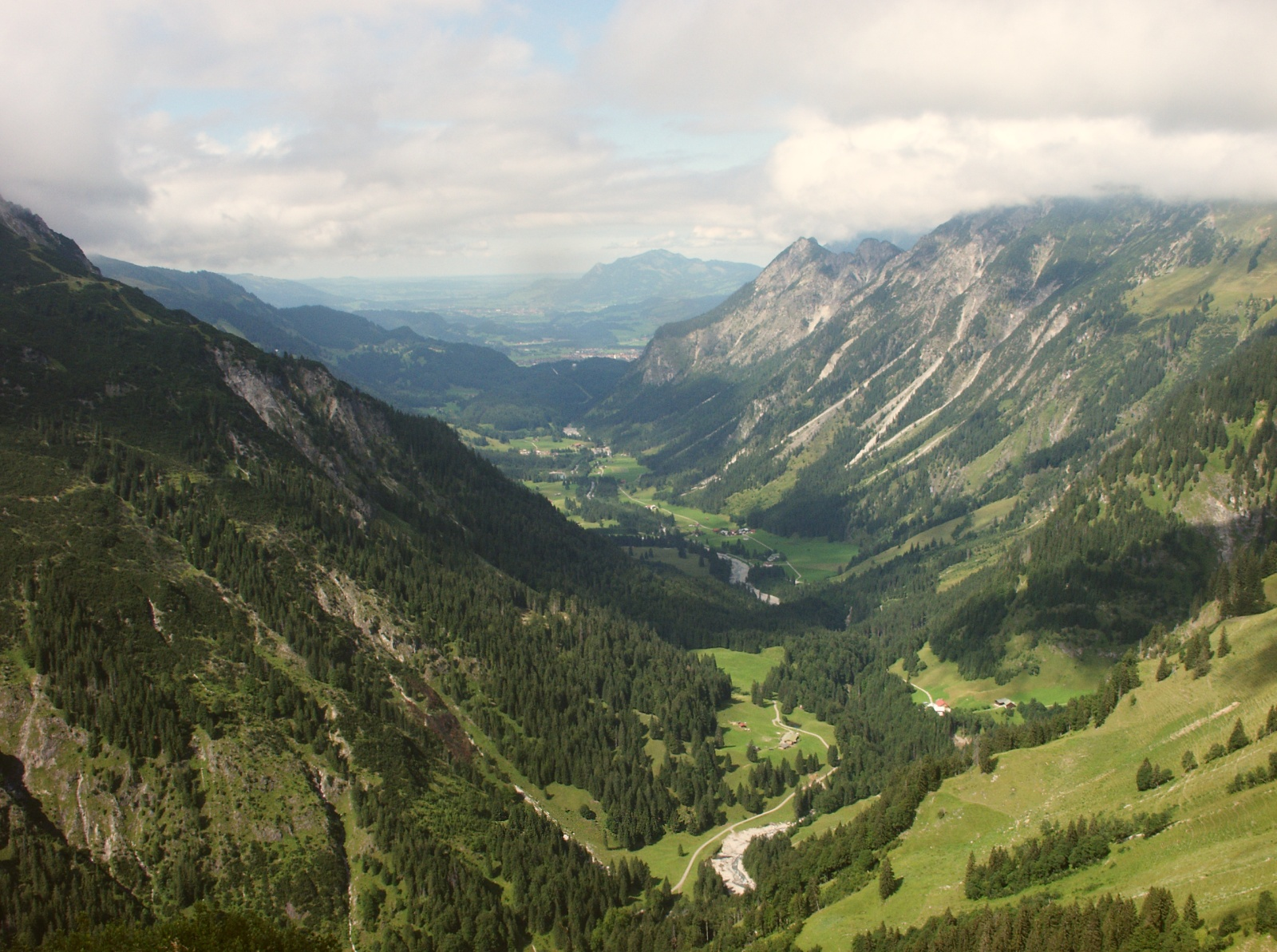 Stillachtal im Süden von Oberstdorfmountain Günten, Germany in the North